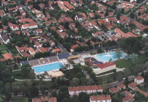 Lido- Békéscsaba- Hungay